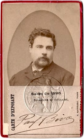 Paul Biva (1851-1900), carte d’exposant au Salon de 1886, coll. privée